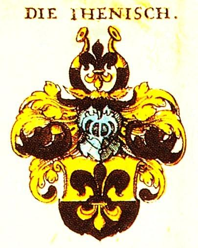 Stamm-Wappen der alten ursprünglich augsburgischen Patrizierfamilie Jenisch (folgend zu Kempten, Memmingen und Hamburg)